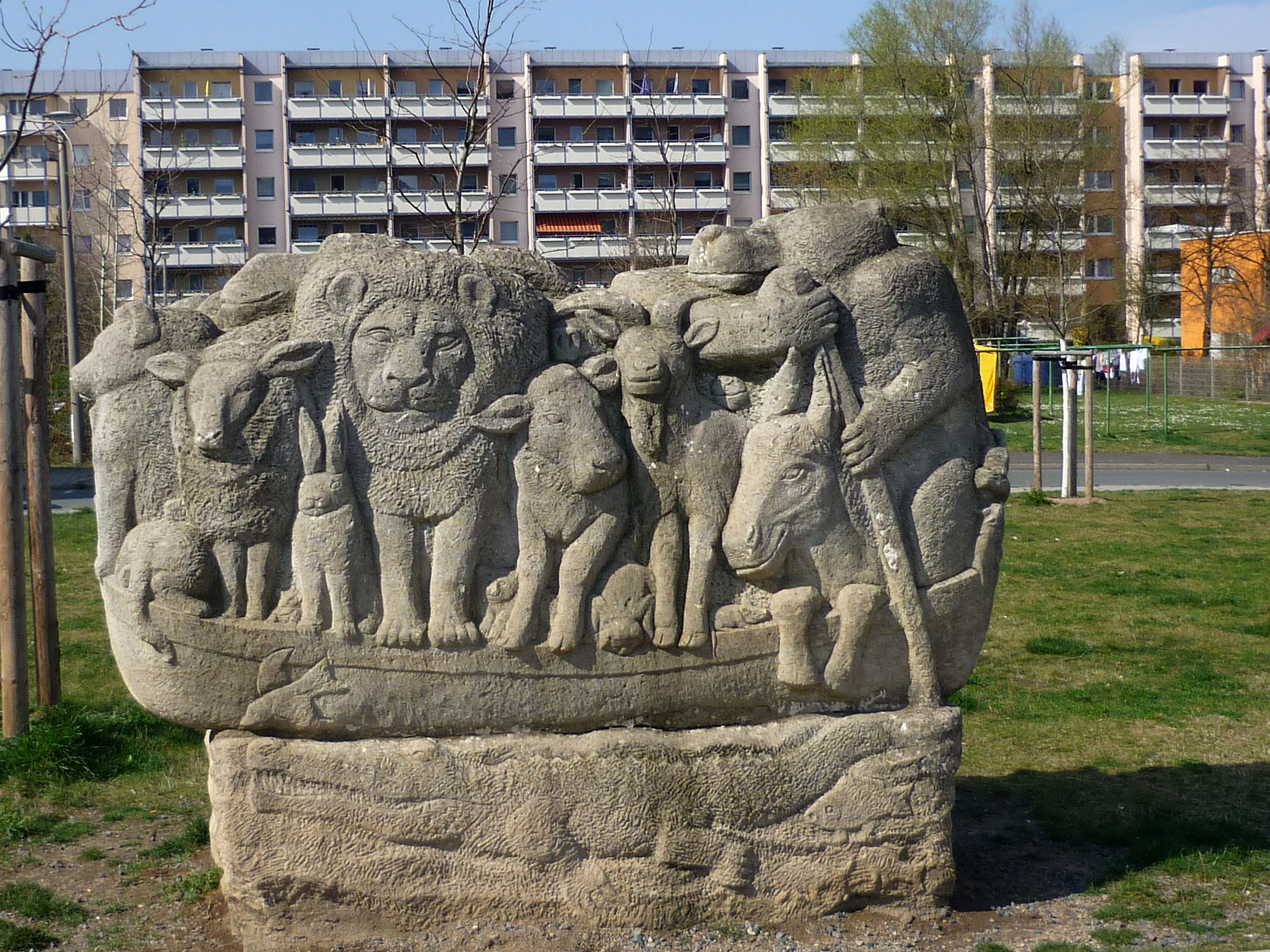 Skulptur Arche in Dresden-Prohlis, Berzdorfer Straße